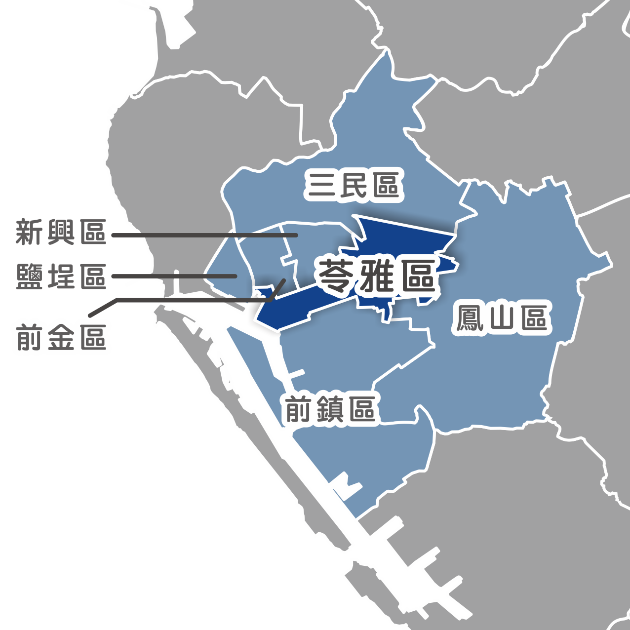 苓雅區相對位置